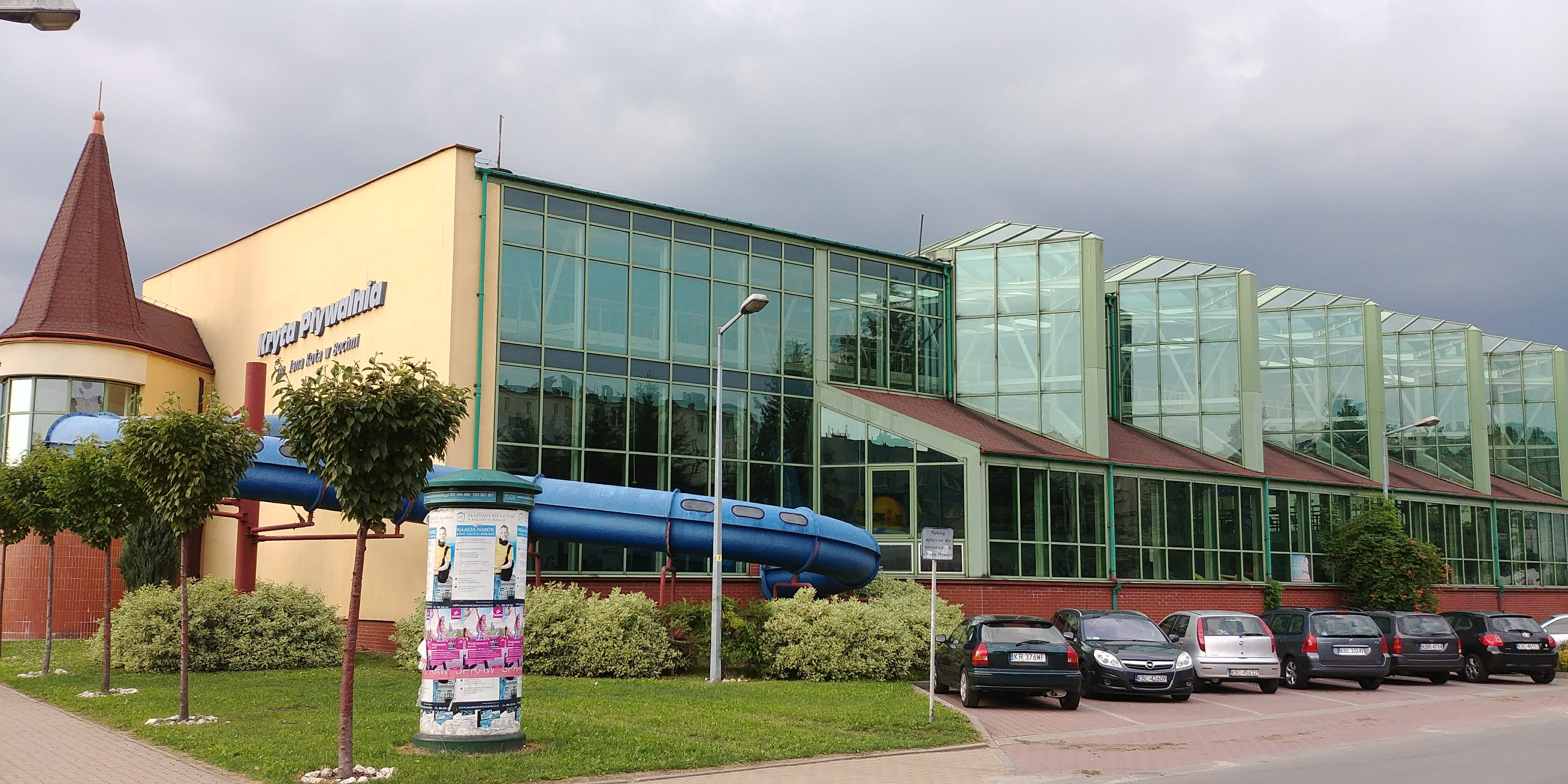 Kryta Pływalnia im. Jana Kota w Bochni.